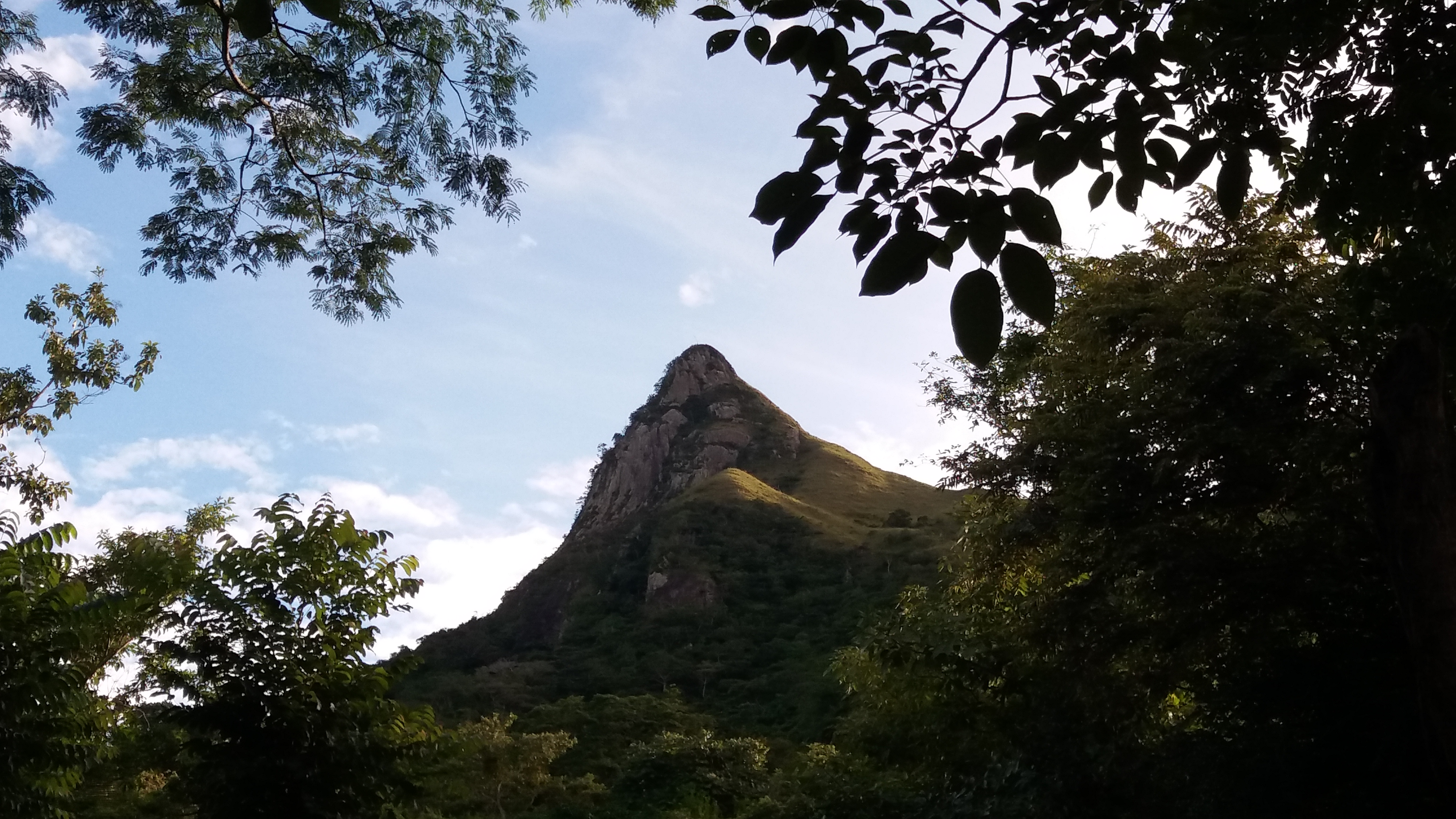 Atardecer del cerro Orari